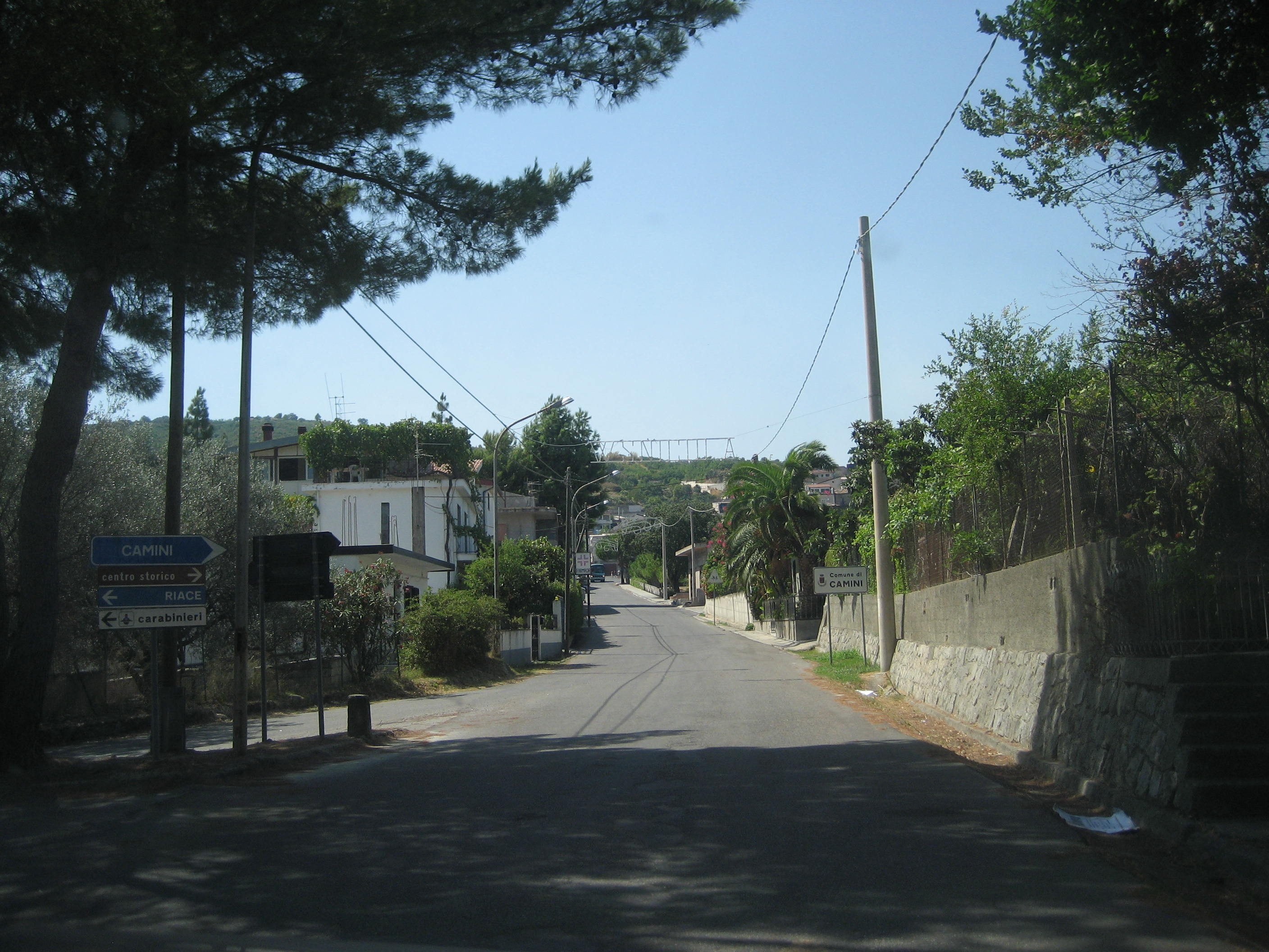 Ingresso Camini